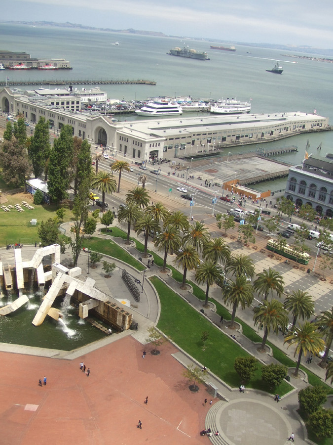 Embarcadero View